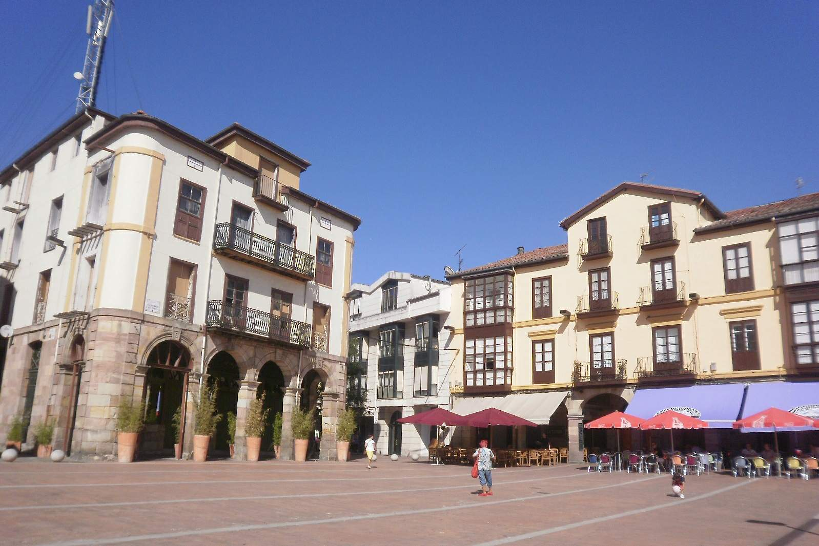 Plaza Baldomero Iglesias (Torrelavega)